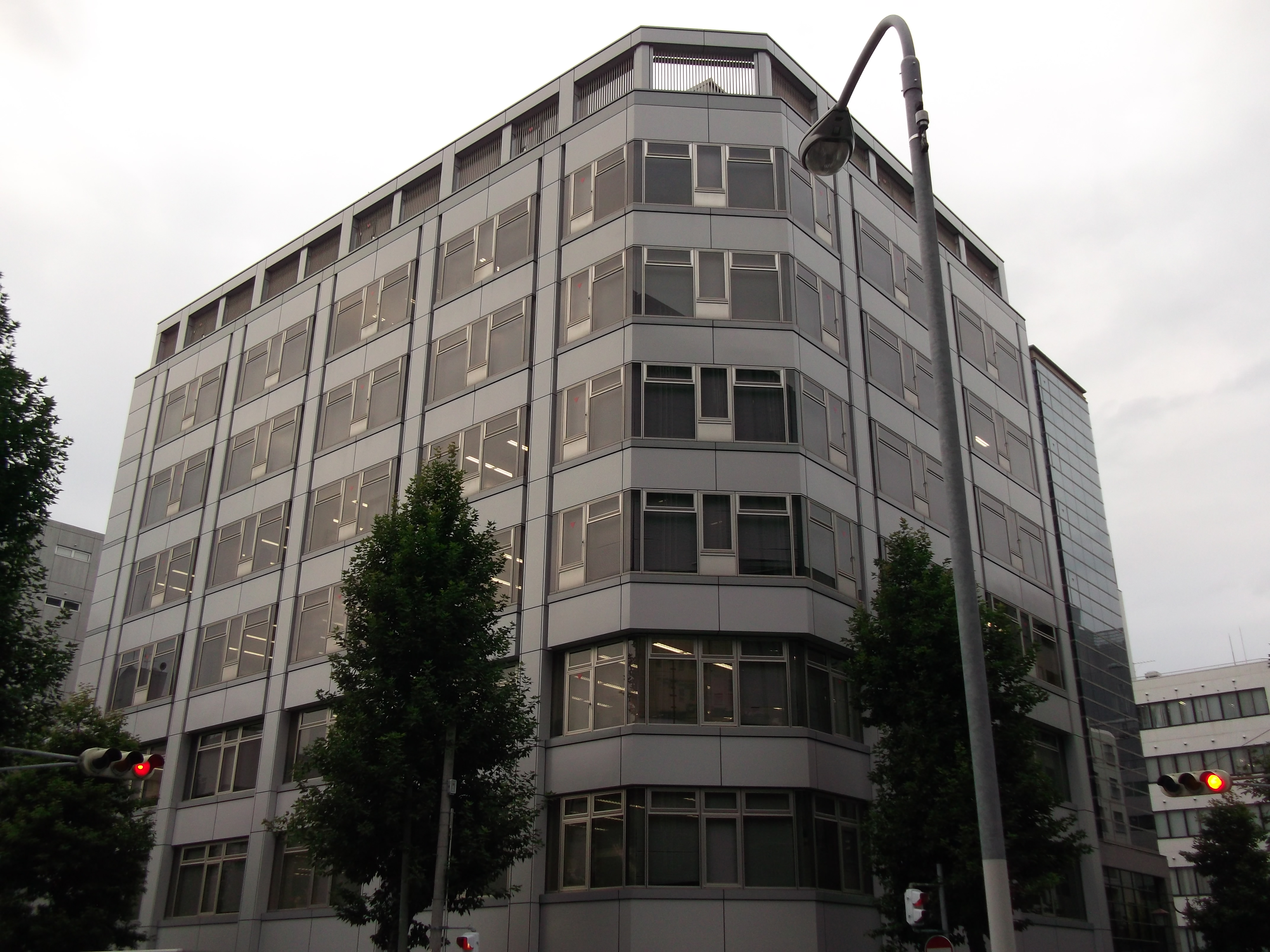 名古屋市中区のオリジン錦ビルを南側公道東側より撮影